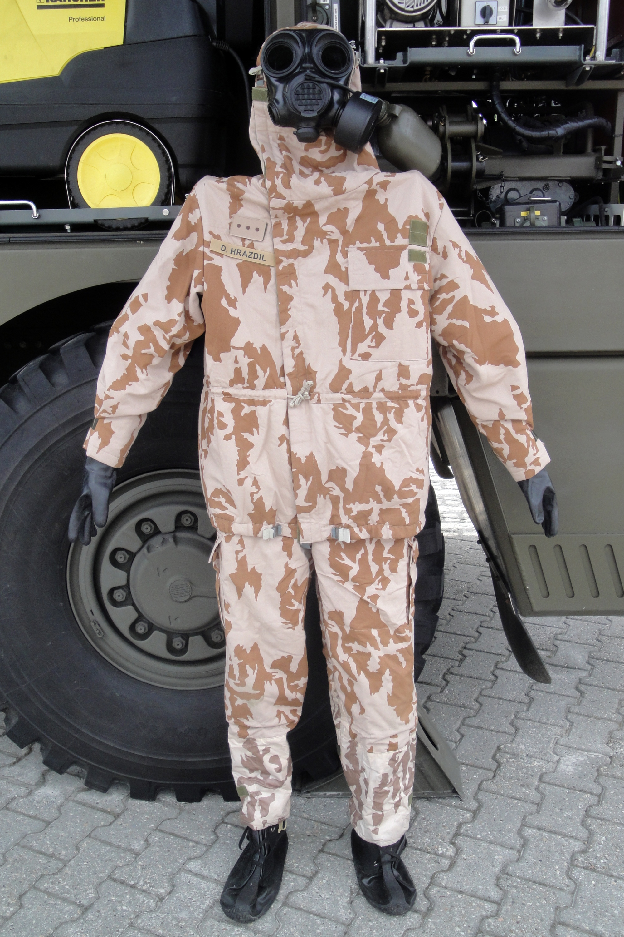 Schutzanzug, IDET/PYROS/ISET 2019, Brünn